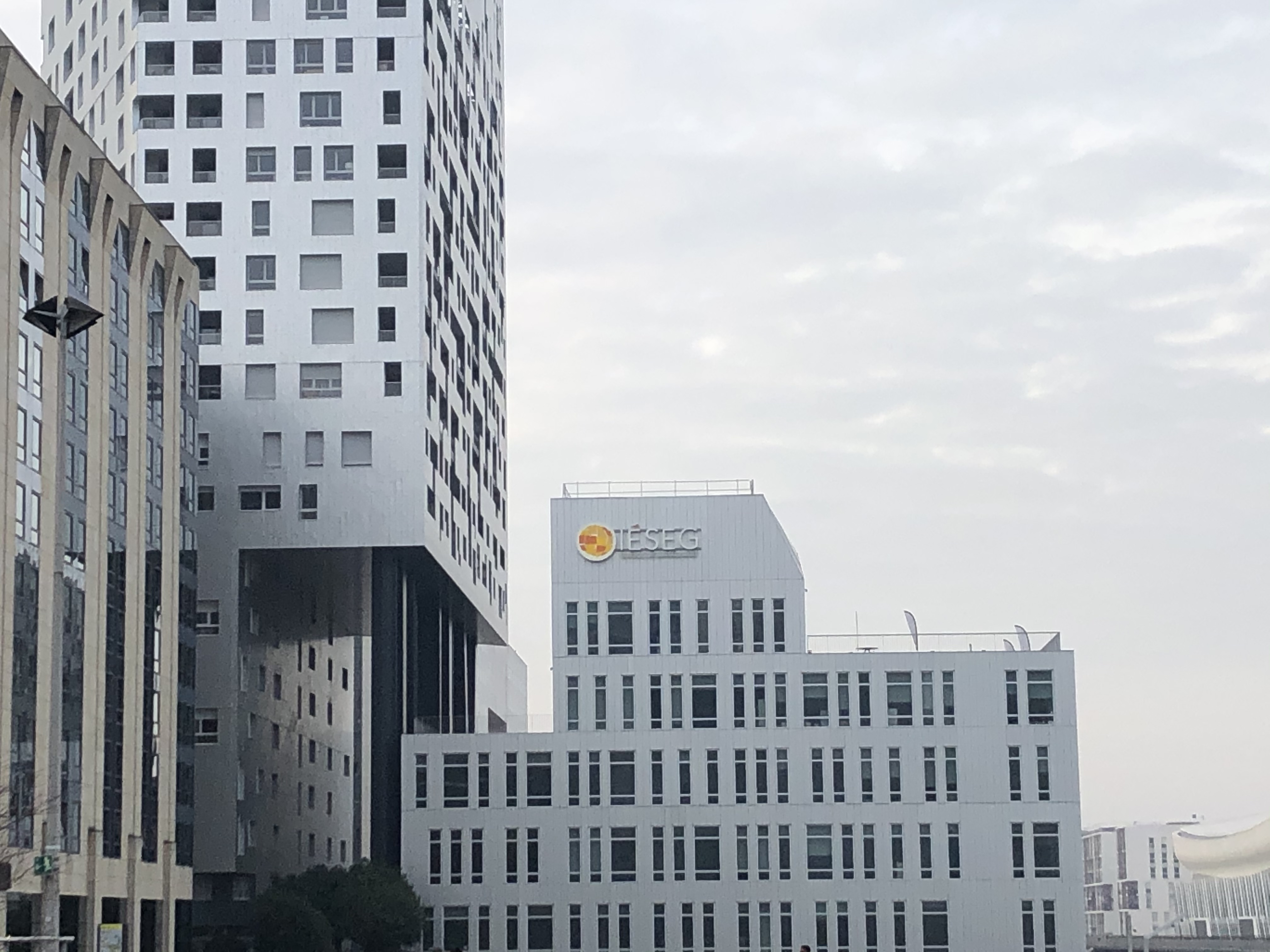 Campus parisien, au pied de la Grand Arche de la Défense de l'IÉSEG School of Management